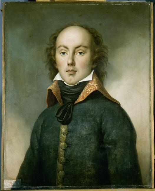 Jean-Baptiste Annibal Aubert du Bayet